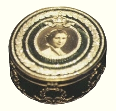 البونبونيرة الفاخرة التي تحمل صورة الملكة فريدة وتوزع في حفل زفافها على الملك فاروق